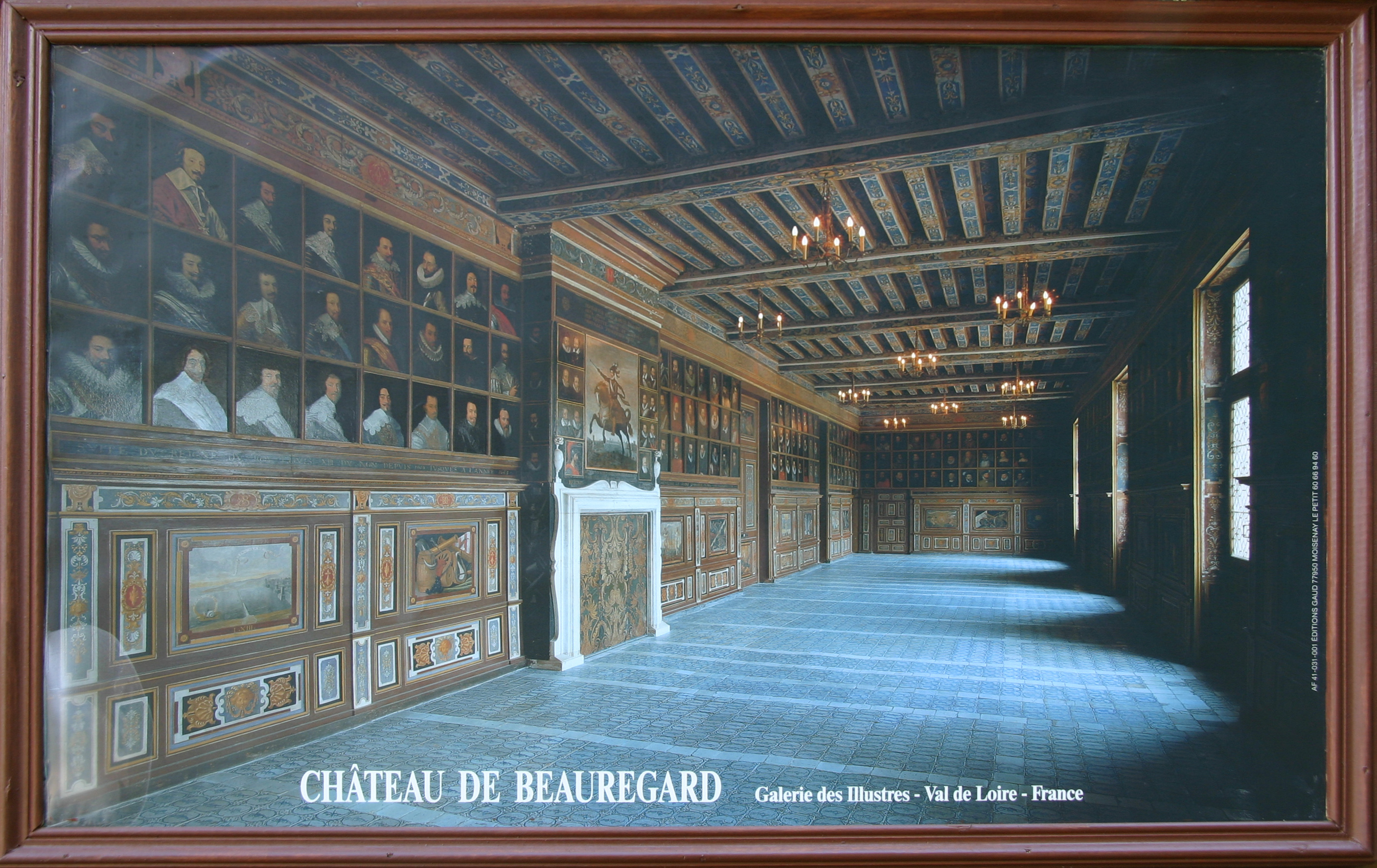 Château de Beauregard